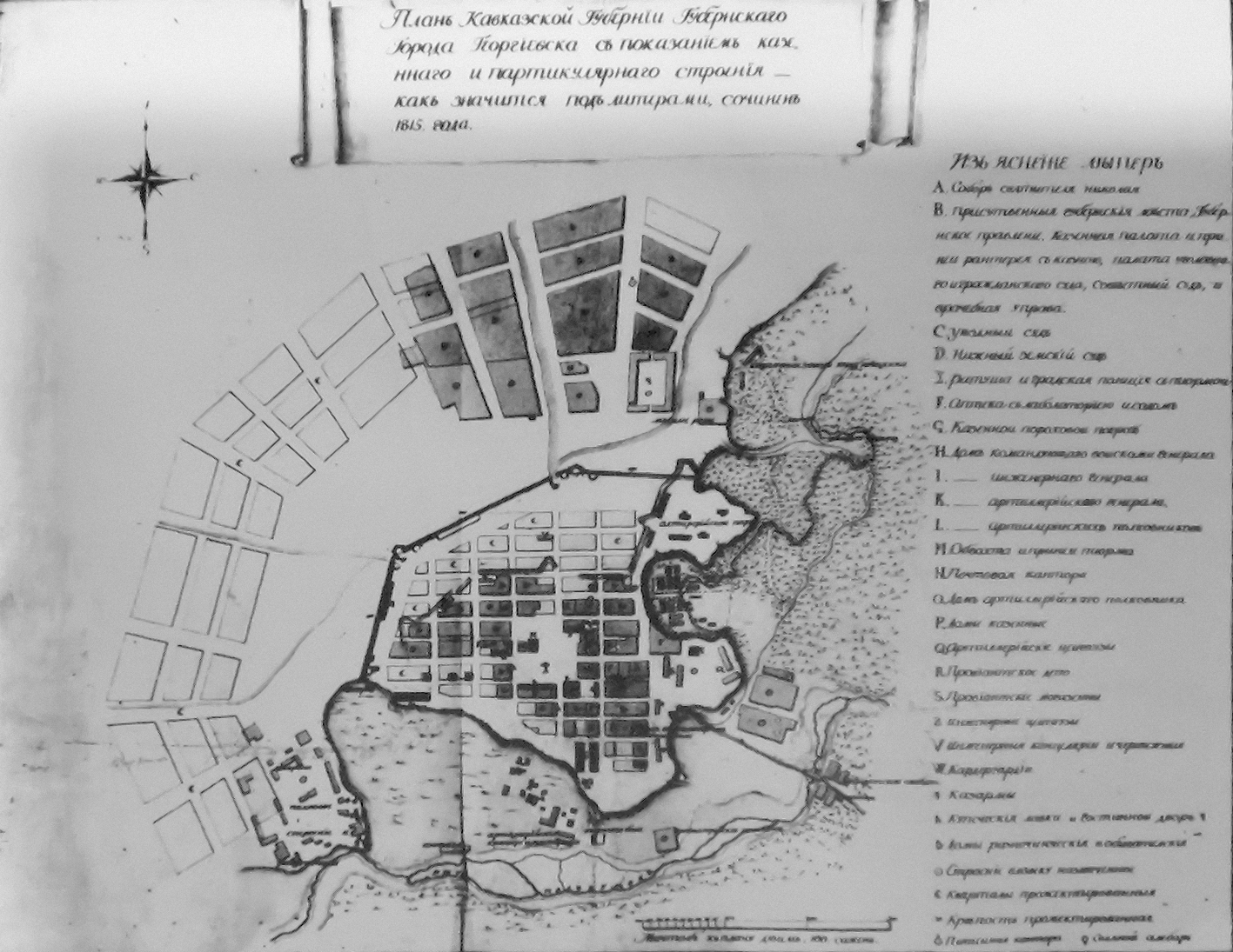 План Георгиевской крепости 1815 год